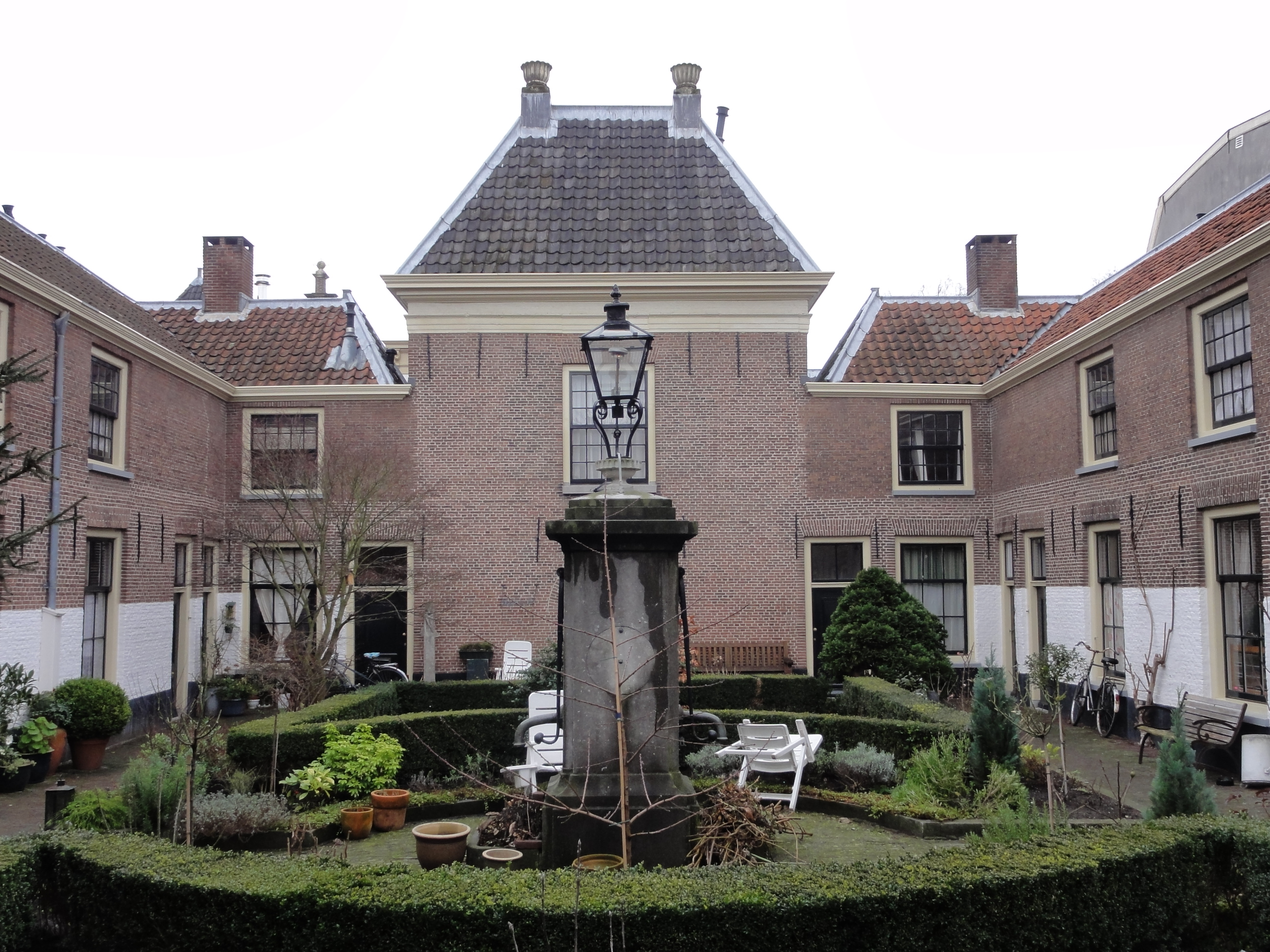 Brouchovenhofje aan de Papengracht 16 te Leiden